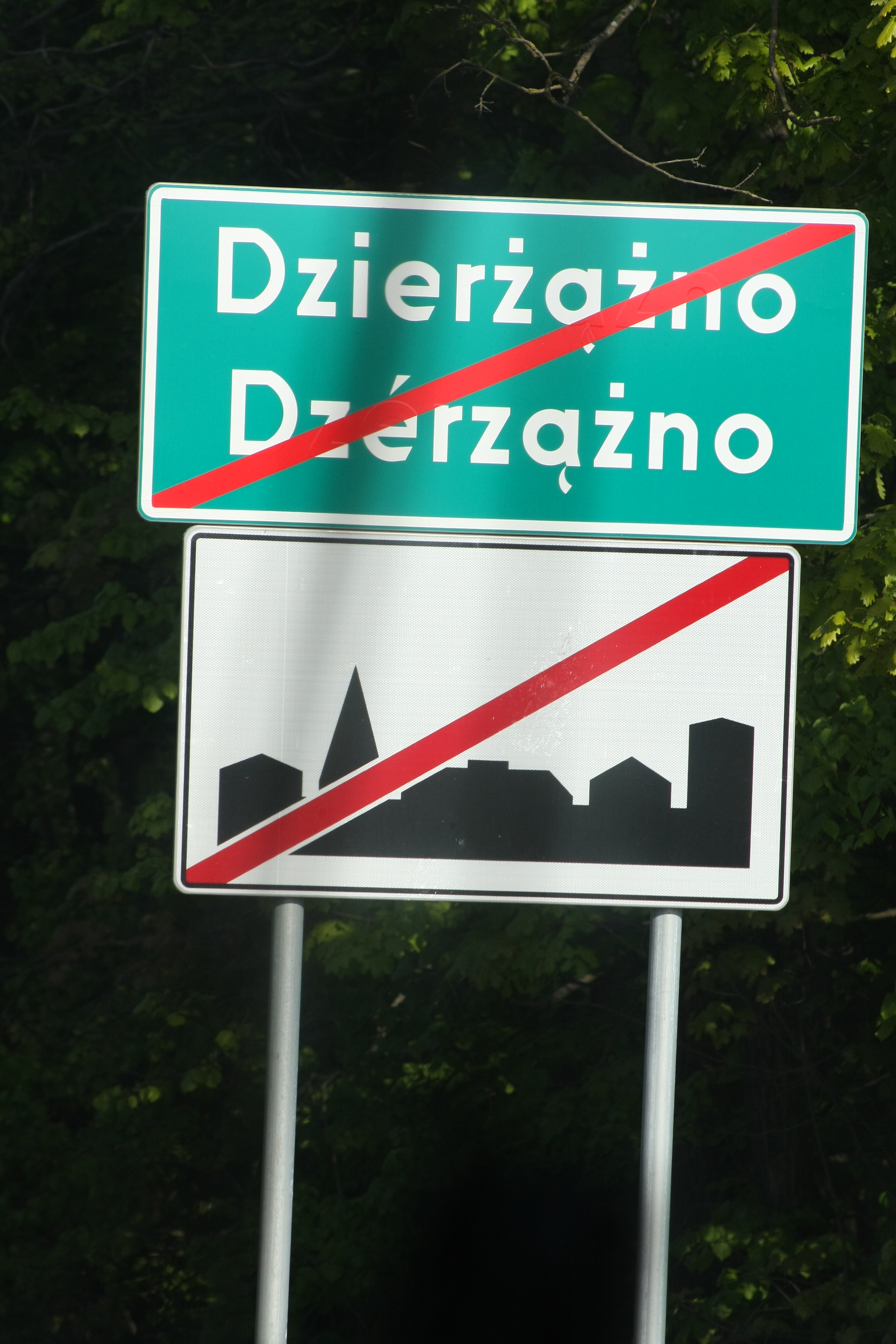 Dwujęzyczna tablica z nazwą przed wyjazdem ze wsi Dzierżążno